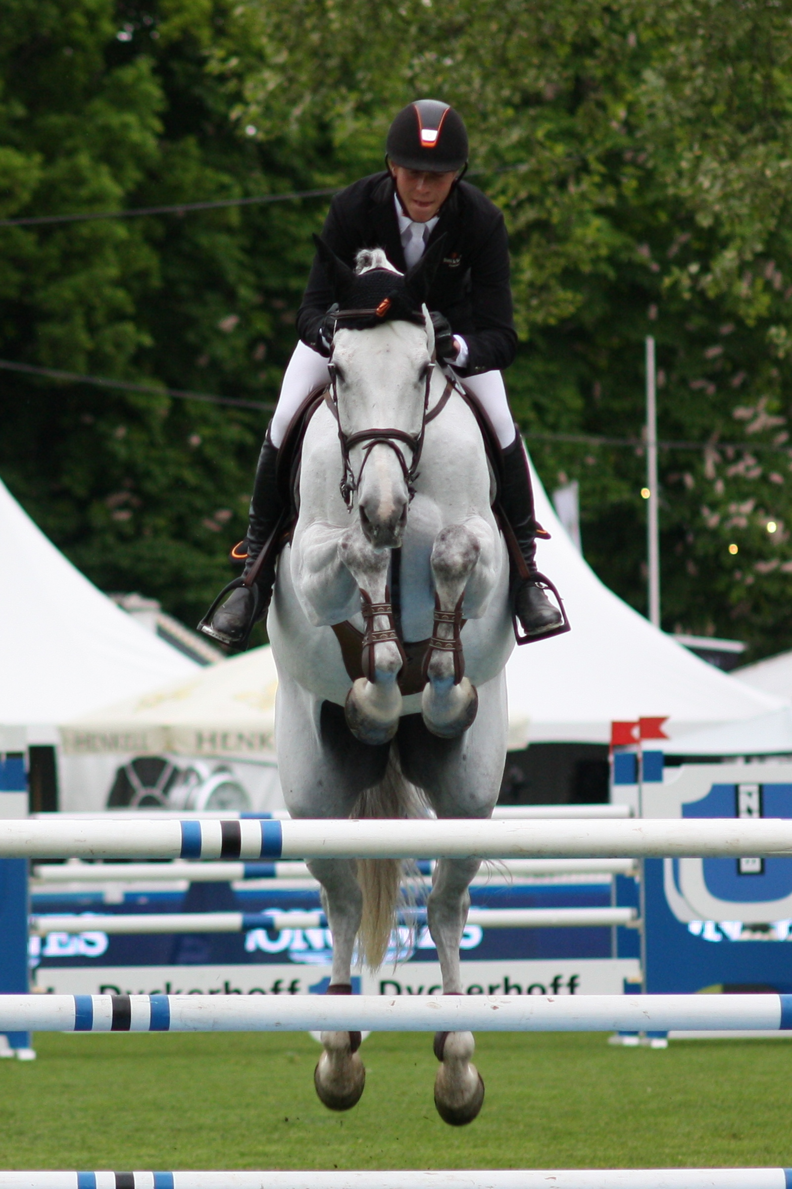 77. Internationanles Wiesbadener Pfingstunier 2013, CSI***** Eröffnungsspringen, David Will auf Juvina Personality rights warning Although this work is freely licensed or in the public domain, the person(s) shown may have rights that legally restrict certain re-uses unless those depicted consent to such uses. In these cases, a model release or other evidence of consent could protect you from infringement claims.